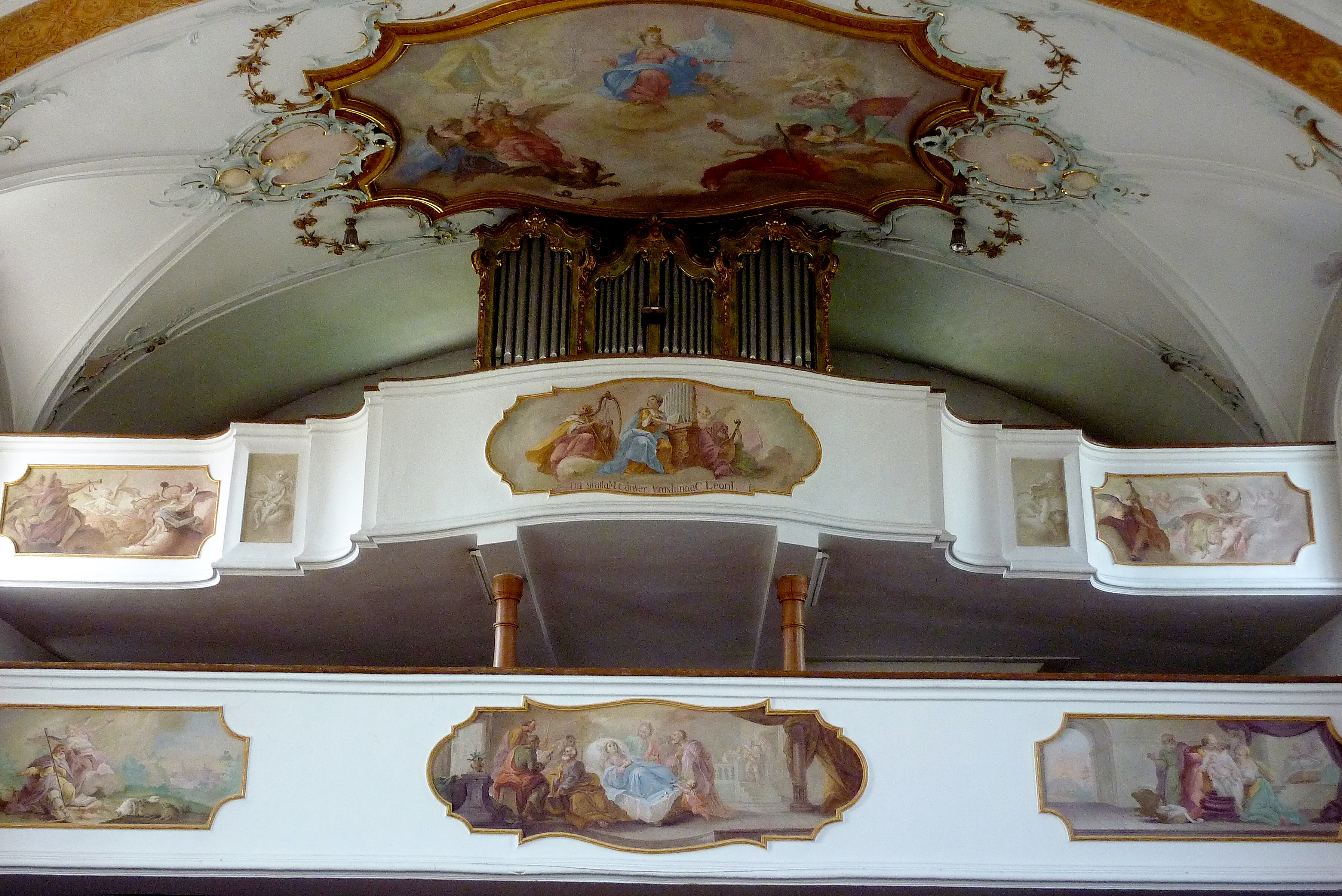 Katholische Pfarr- und Wallfahrtskirche Mariä Heimsuchung in Gottmannshofen, einem Stadtteil von Wertingen im Landkreis Dillingen an der Donau (Bayern), Orgelempore mit Fresken von Johann Baptist Enderle (1725–1798). Darstellungen der unteren Empore: Szenen aus dem Leben Mariens; Darstellungen an der oberen Empore: musizierende Engel, hl. Cäcilia spielt Orgel, David spielt Harfe, der hl. Franziskus spielt die Laute.